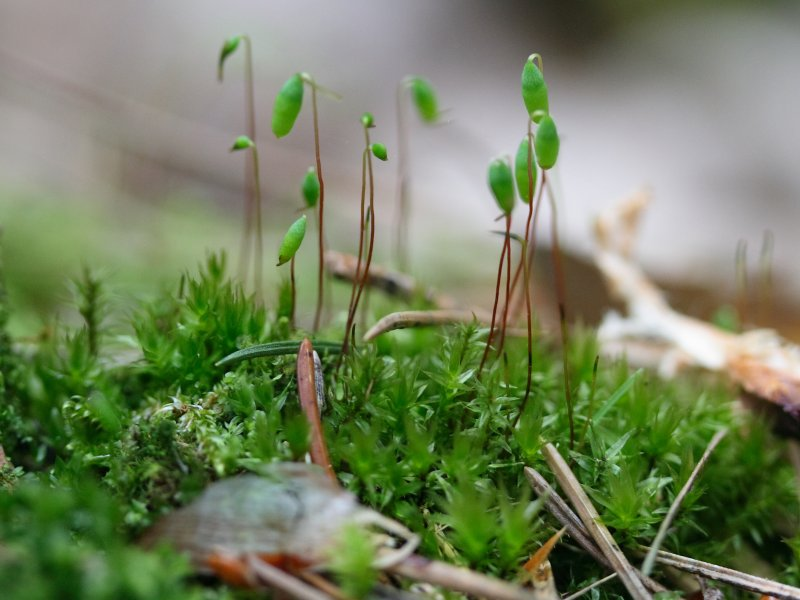 Nickendes Pohlmoos (Pohlia nutans)